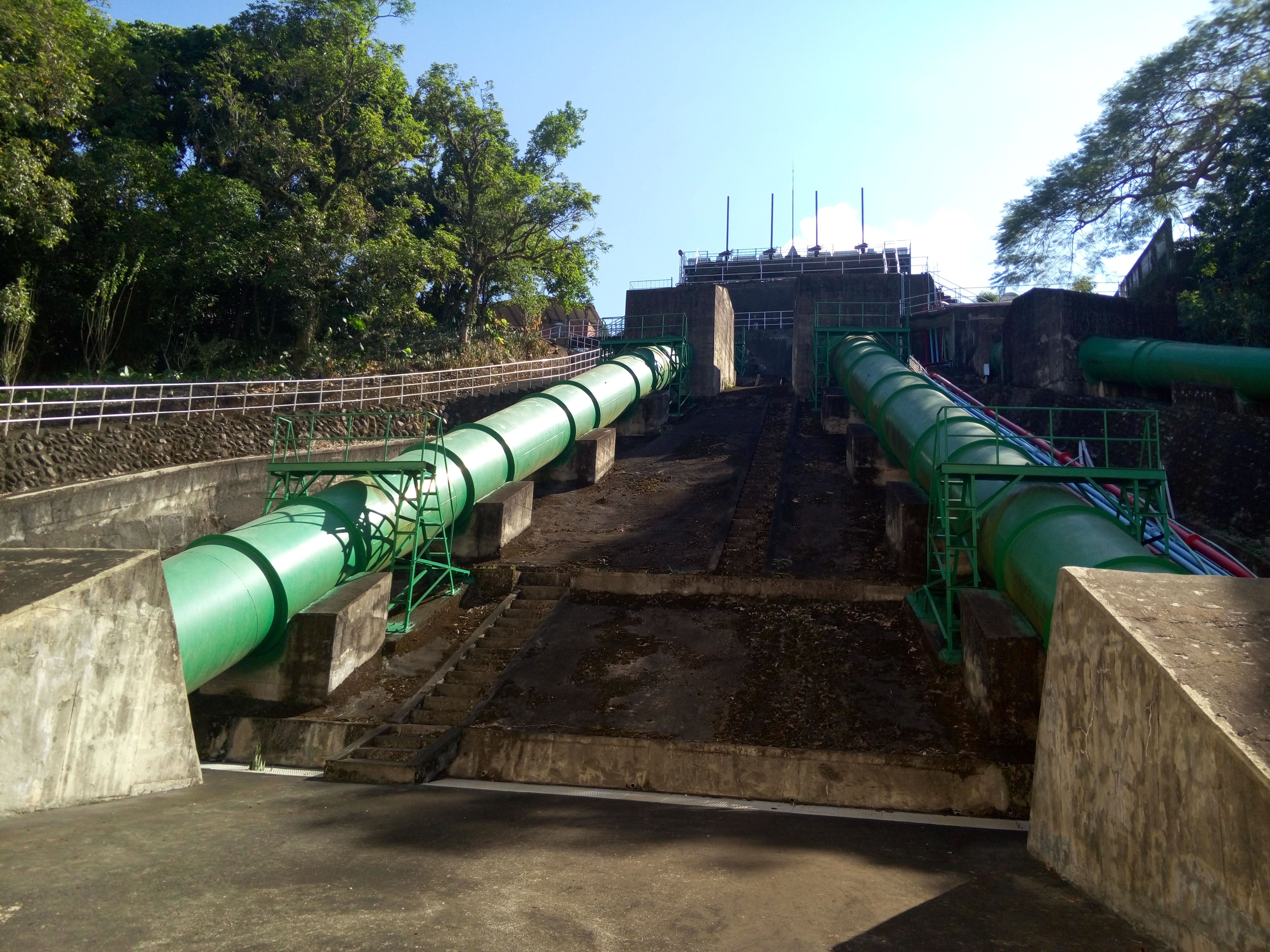 臺灣電力公司高屏發電廠六龜機組